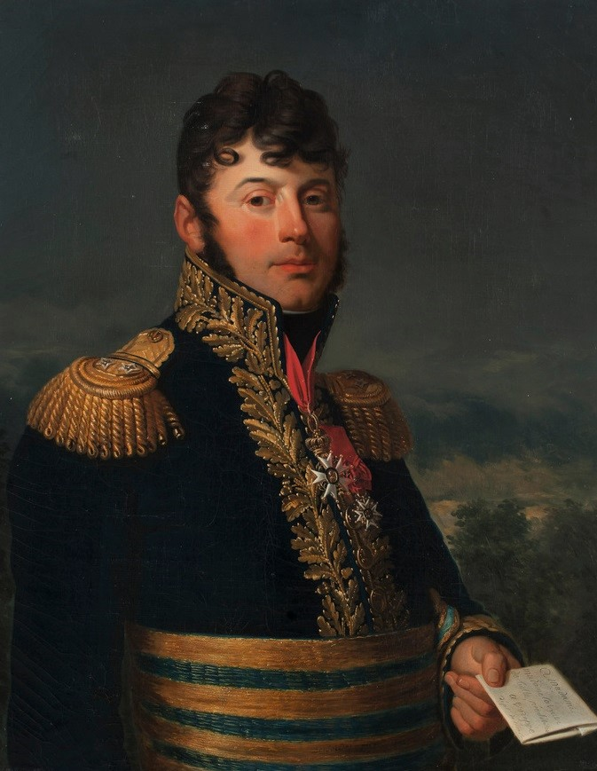 César Alexandre Debelle (1770-1826), général de brigade et baron de l'Empire.